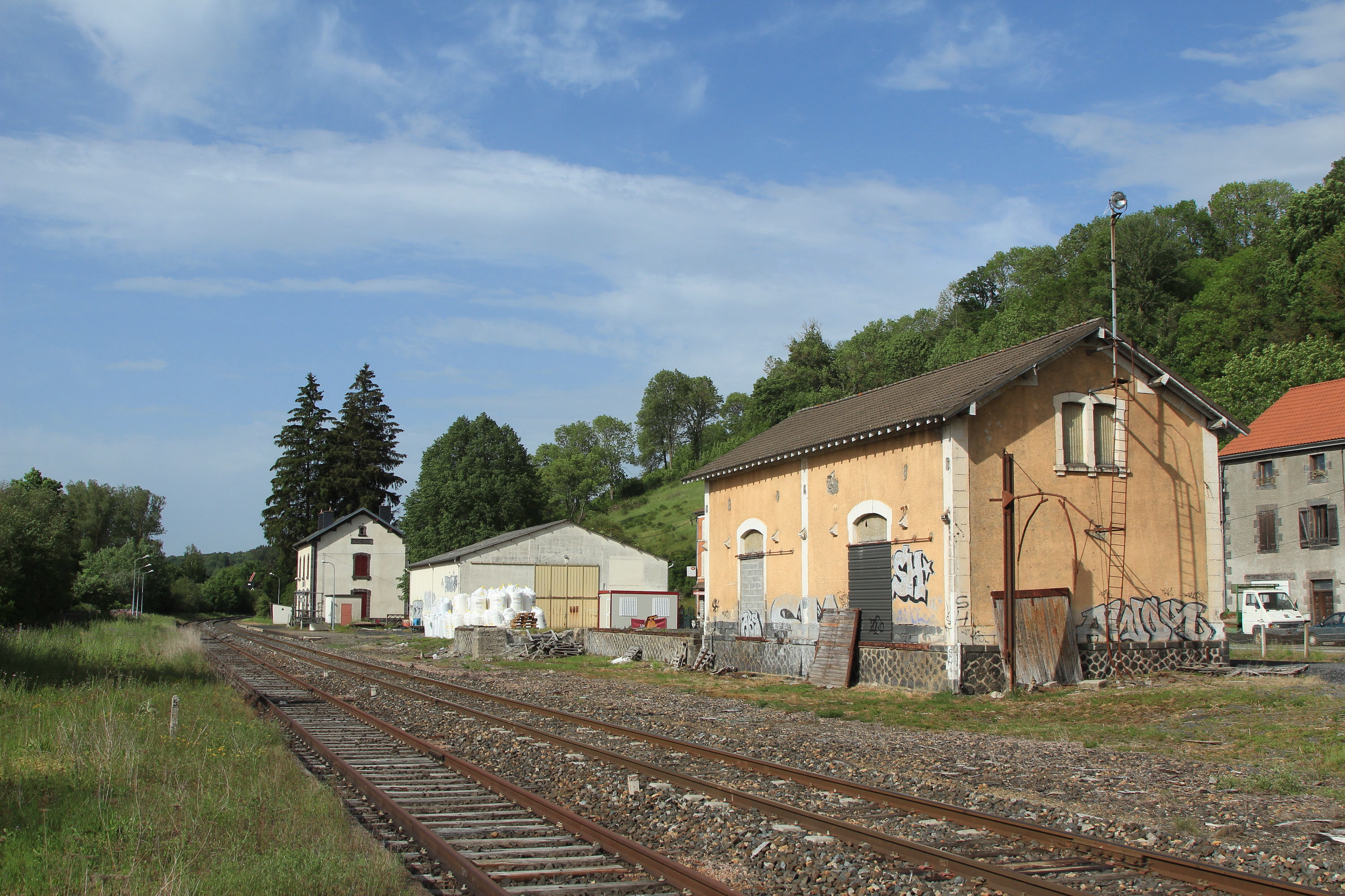 Vue générale de la gare de Pontgibaud, avec en premier plan, l'ancienne halle à marchandises.